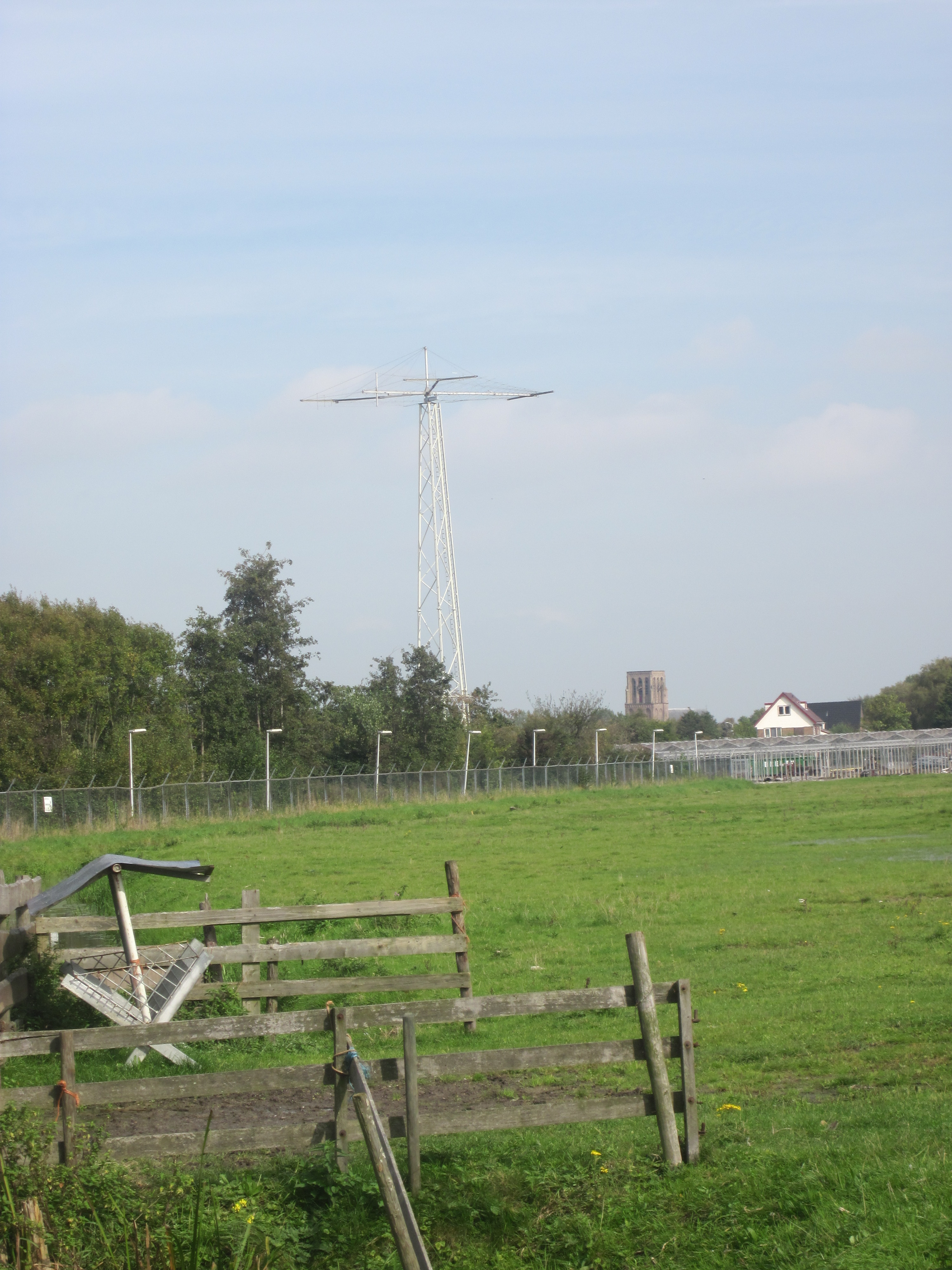 Antenne op de plaats waar het Schefferkamp gestaan heeft. Op de achtergrond is de Domkerk van De Lier, Nederland nog te zien.